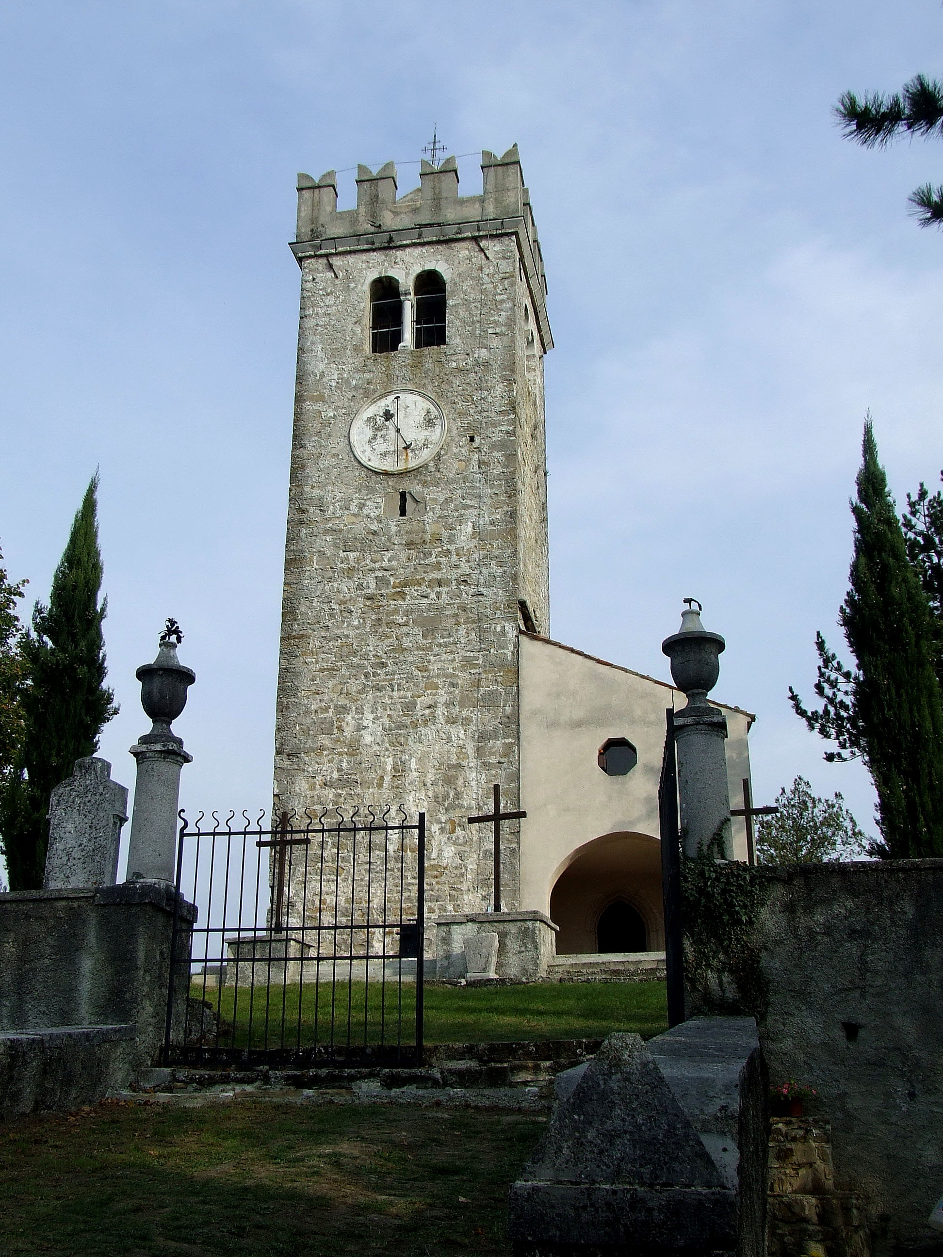 Cerkev v Kojskem, Brda